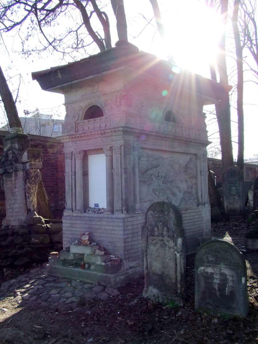 Ber Sonnenbergs Mausoleum, sun beams